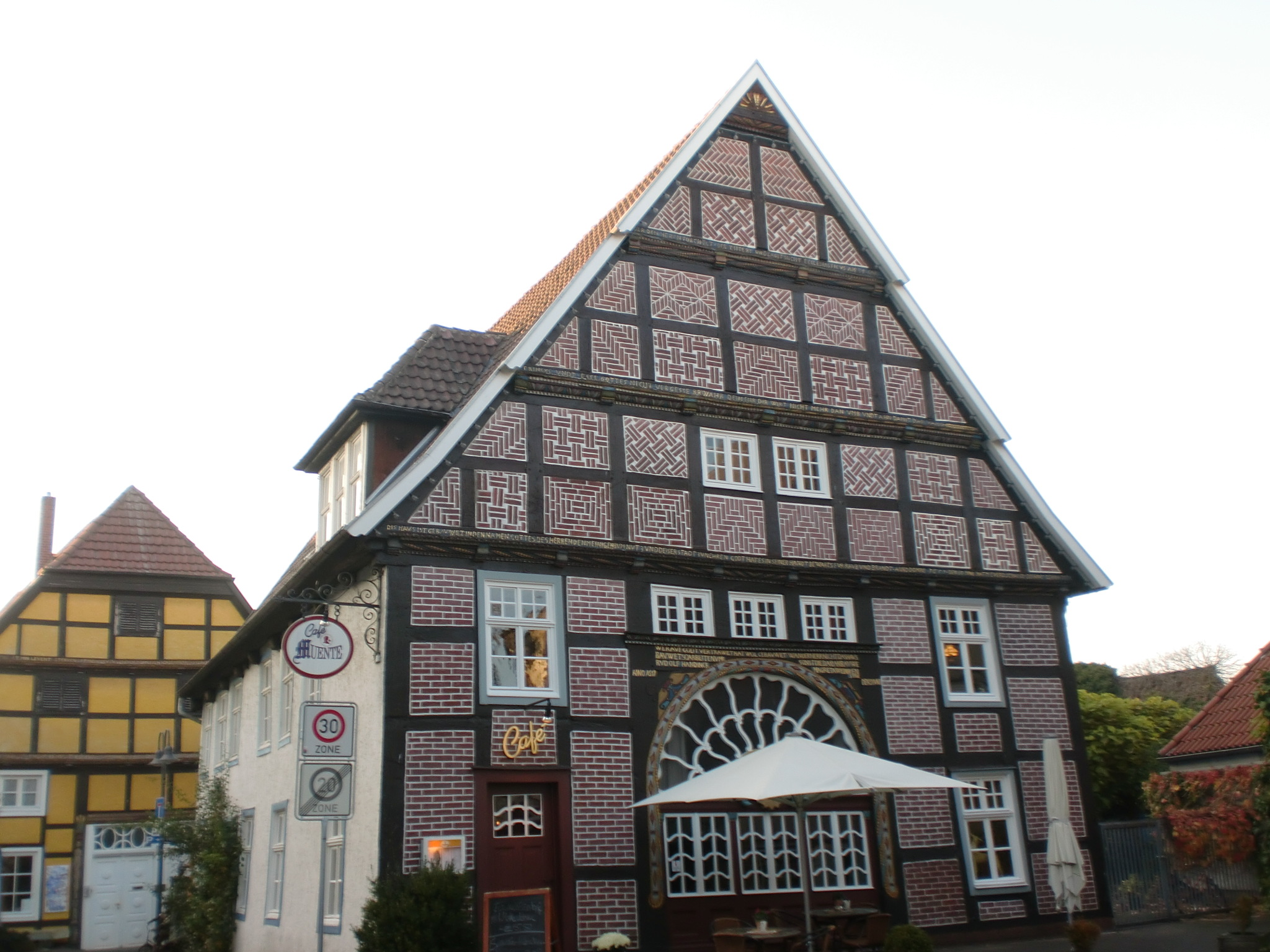 Rietberg, Müntestrasse 2 This is a photograph of an architectural monument.